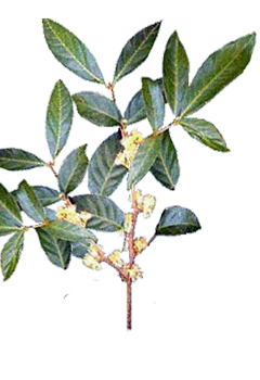 plantita